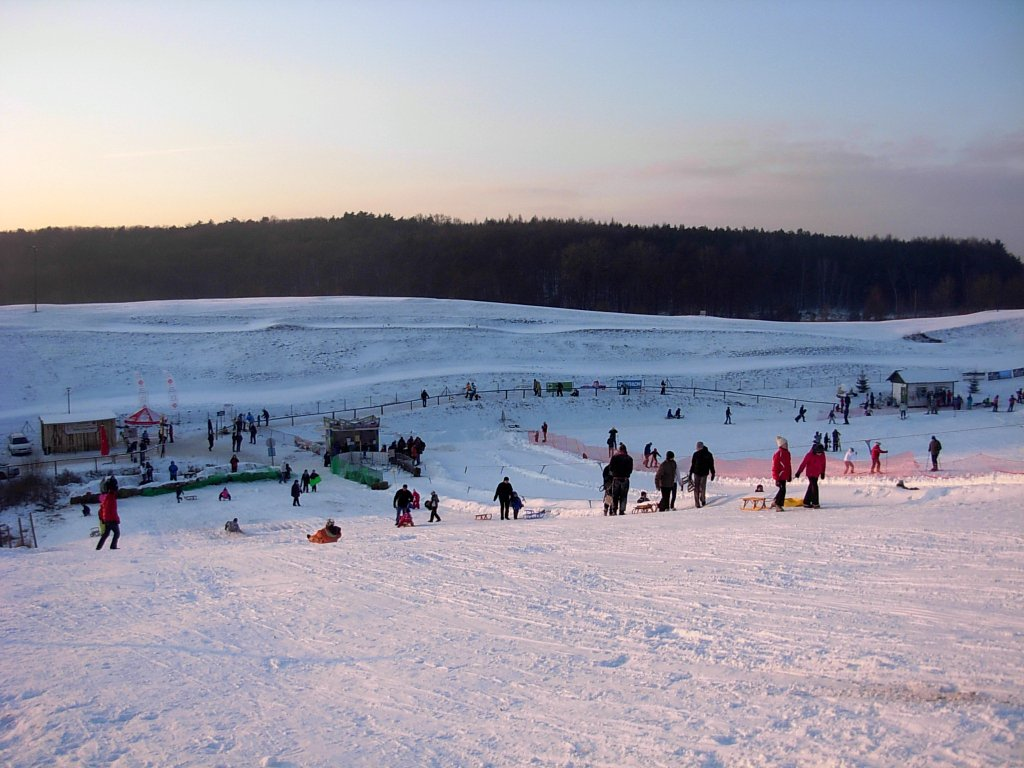 Stok saneczkowy w Bydgoszczy-Myślęcinku